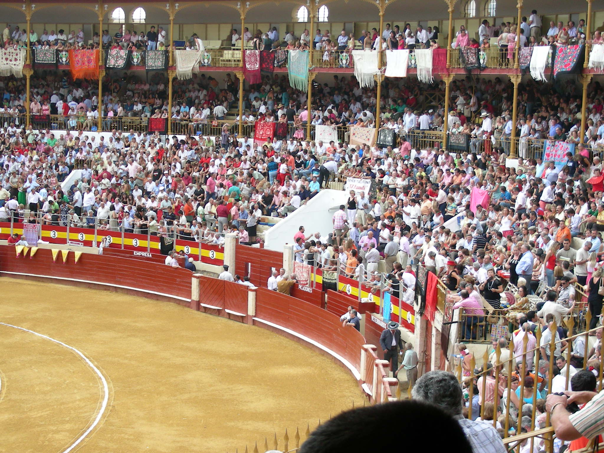 Tarde de toros en la Feria de Agosto de Almería